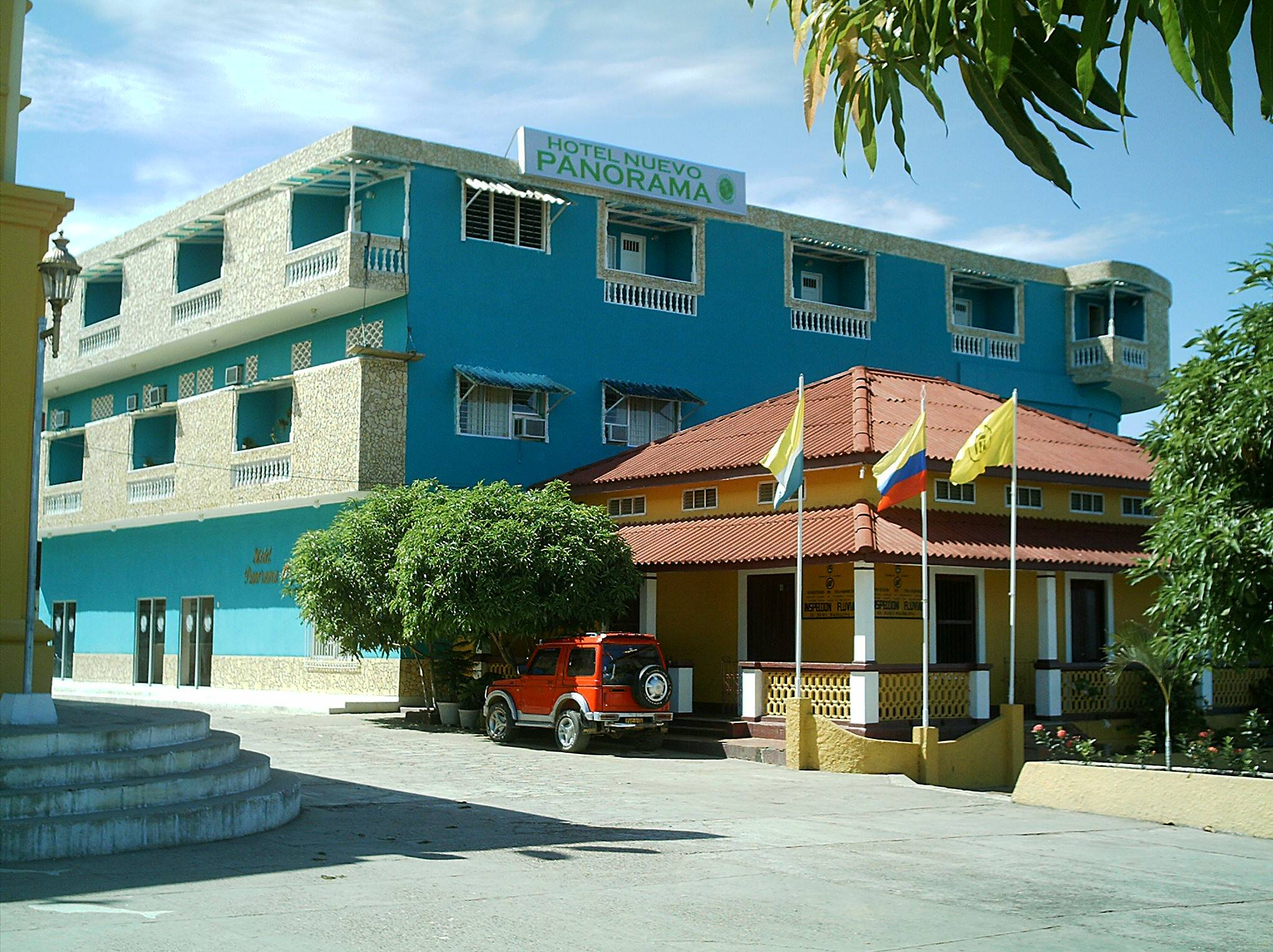 Hotel Panorama e inspeccion fluvial ubicados al lado derecho de la Catedral de Nuestra Señora de la Candelaria, en El Banco (Magdalena)